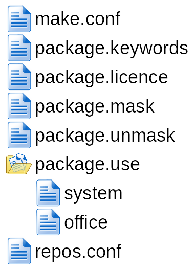 Portage konfigurációs könyvtár